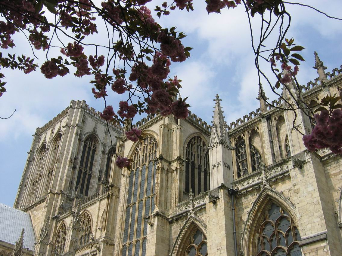 Das York Minster, größte mittelalterliche Kirche Großbritanniens, im Frühling.